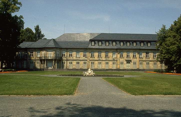 Photo personnelle. Pas de copyright